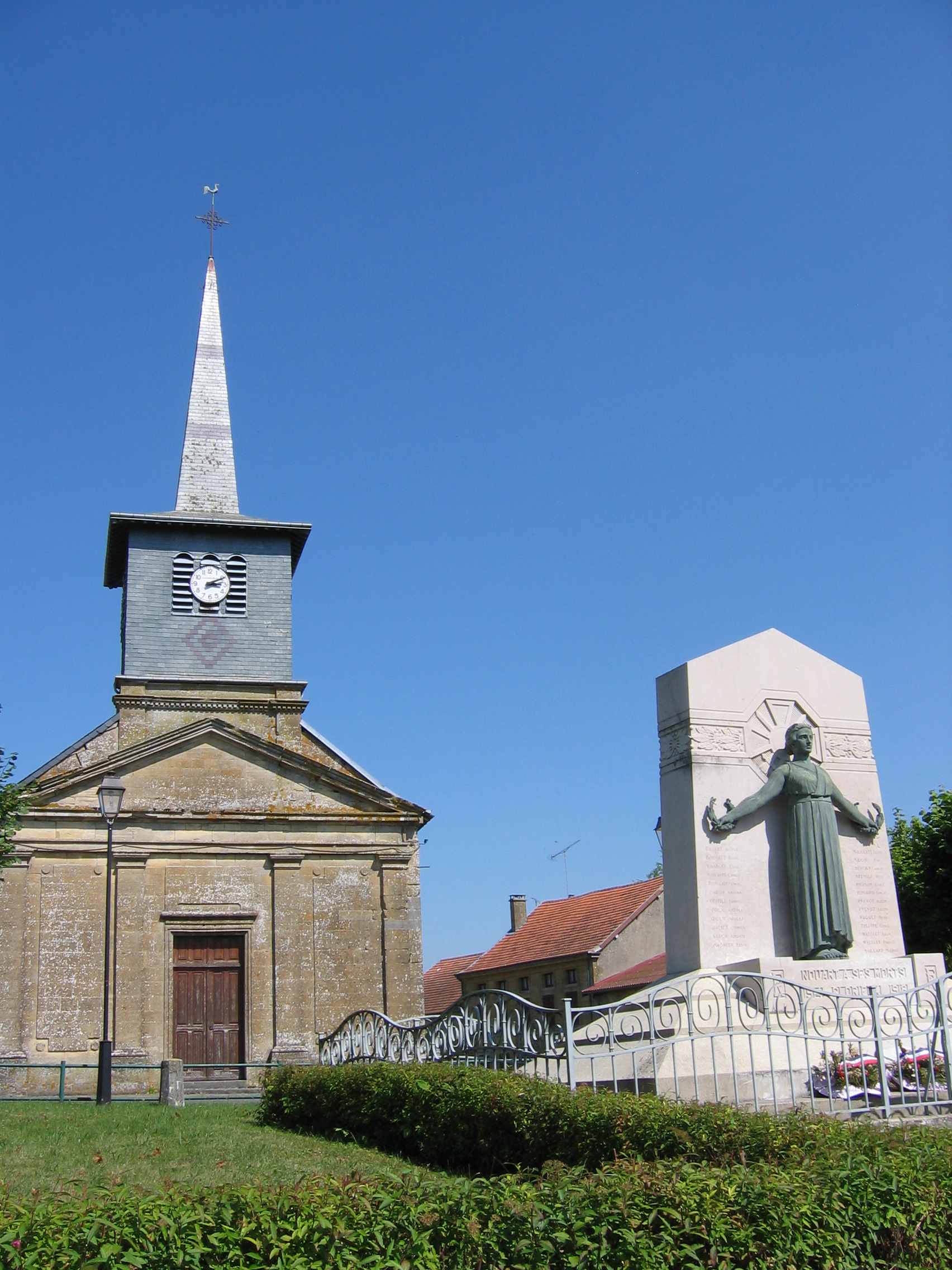 Nouart, église et monument aux morts